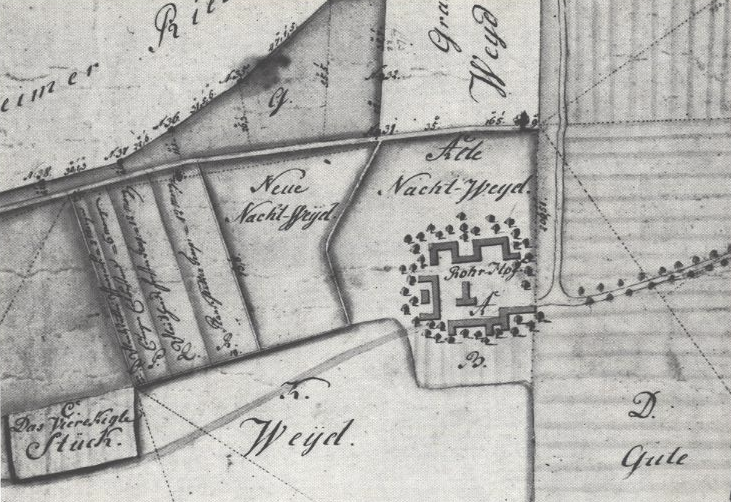 Gemarkungsplan von Rohrhof um 1800.